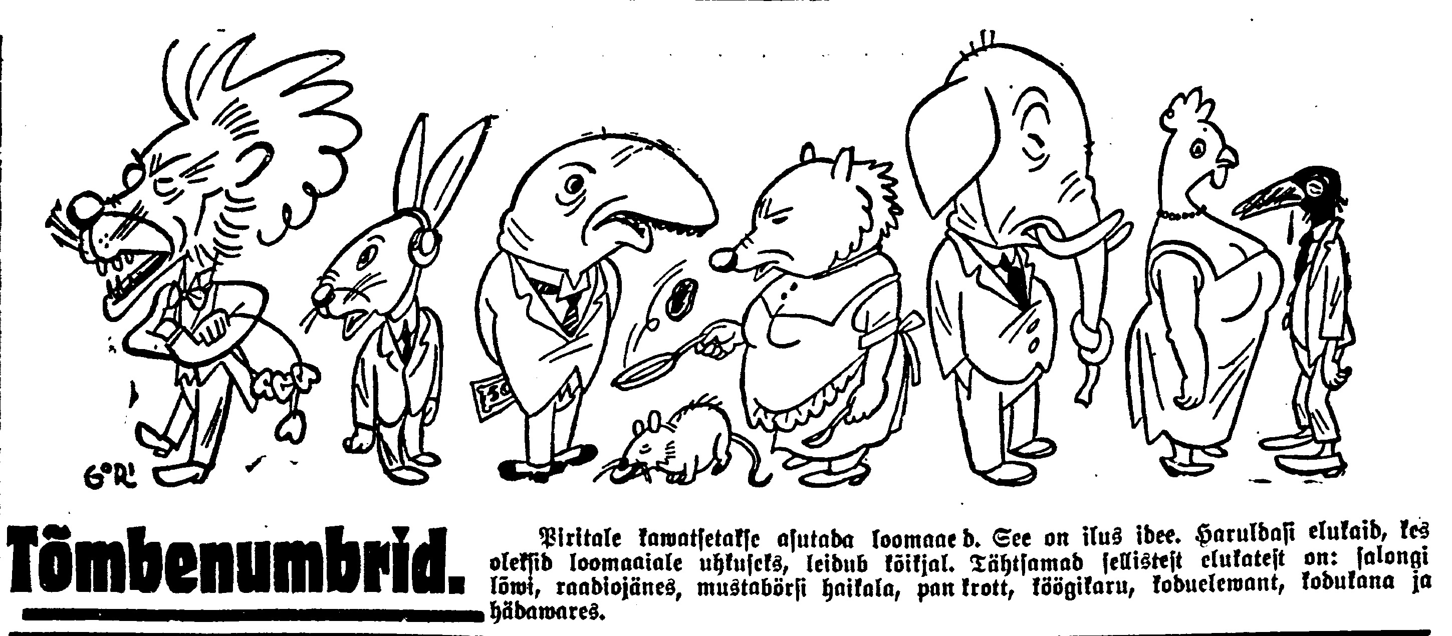 Tõmbenumbrid. Piritale kavatsetakse asutada loomaaed. See on ilus idee. Haruldasi elukaid, kes oleksid loomaaiale uhkuseks, leidub kõikjal. Tähtsamad sellistest elukatest on: salongi lõvi, raadiojänes, mustabörsi haikala, pan krott, köögikaru, koduelevant, kodukana ja hädavares.